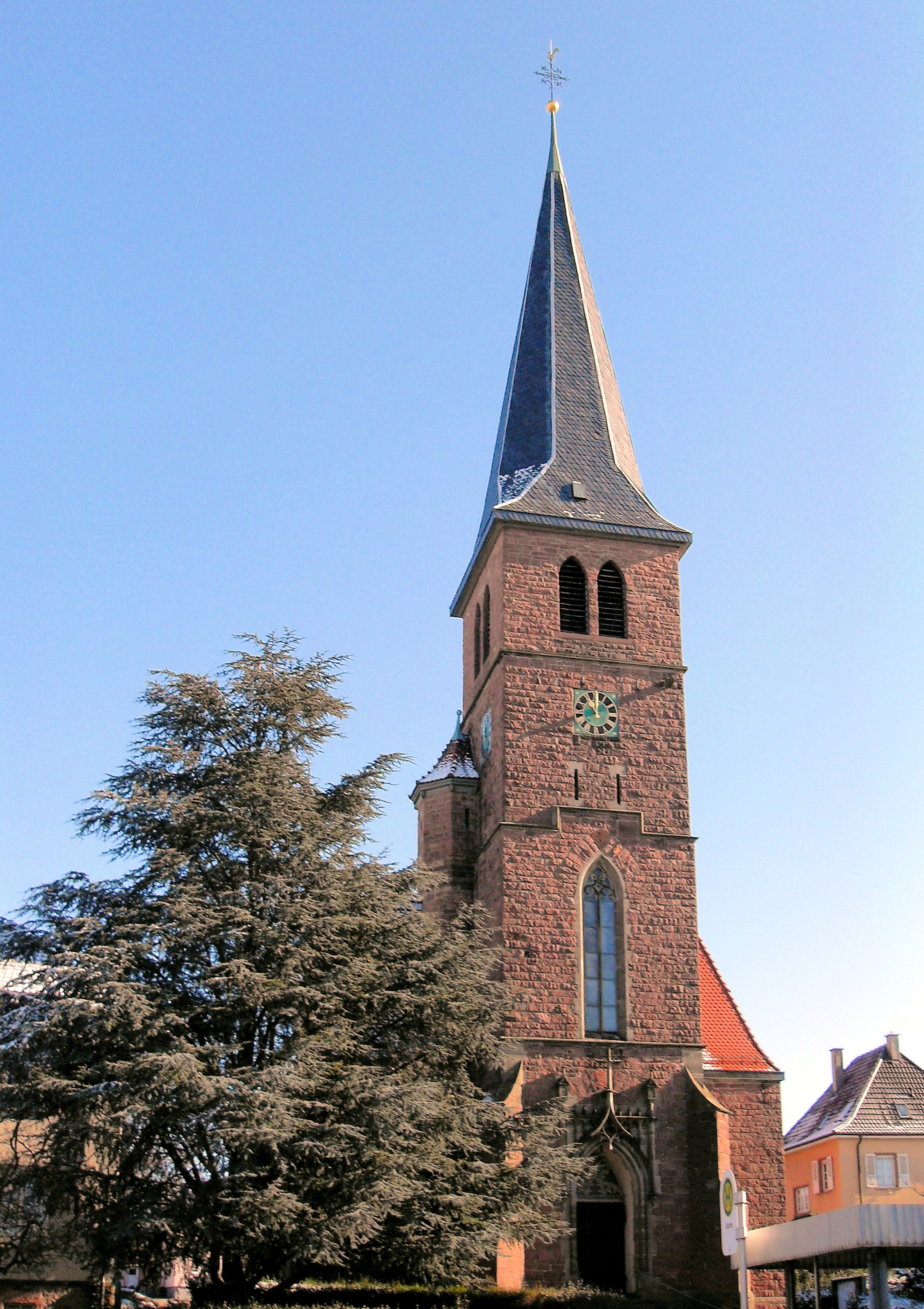 Kirche St. Anna in Bischweier